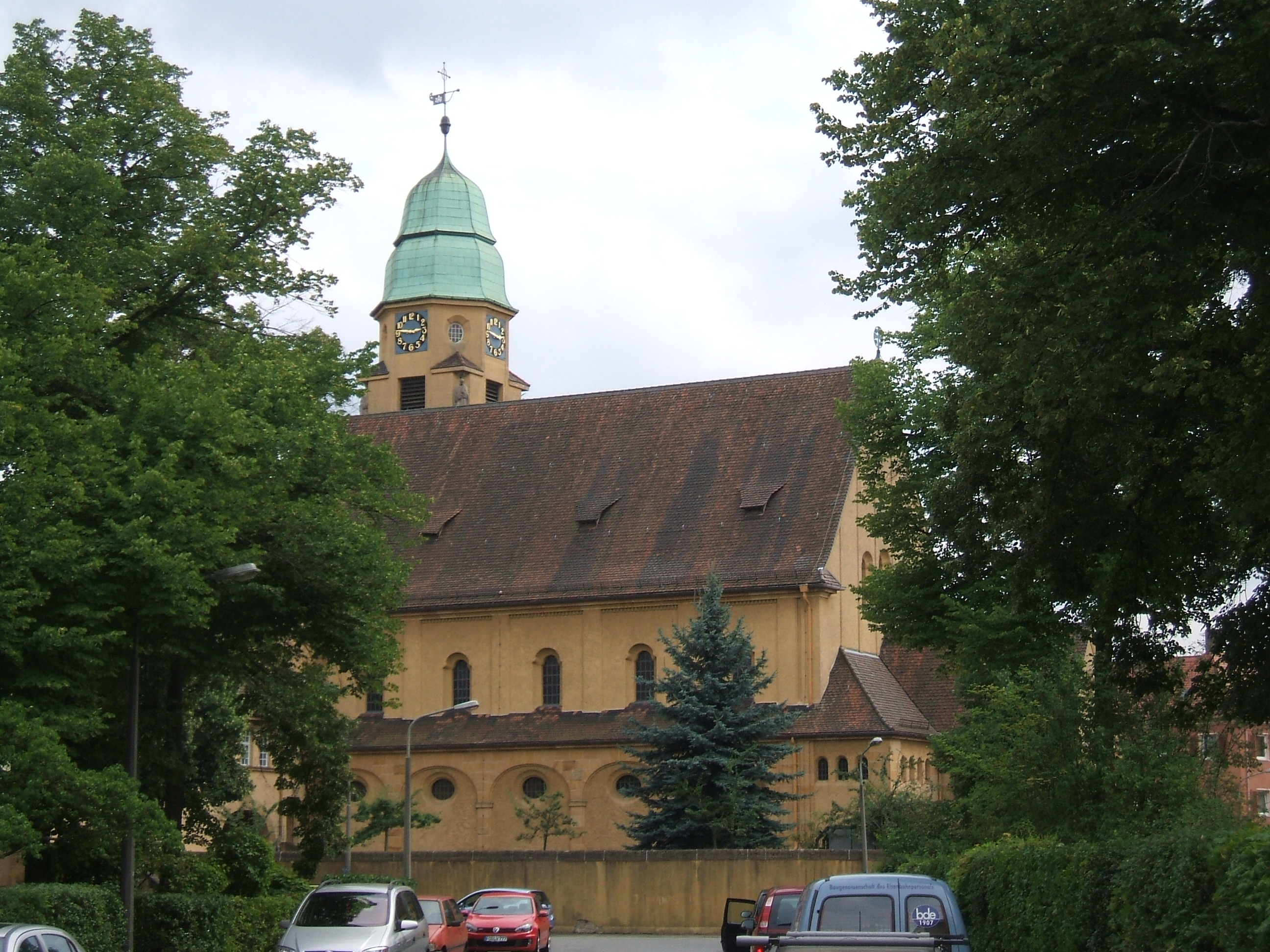 Katholische Pfarrkirche St. Willibald in Nürnberg-Rangierbahnhofsiedlung